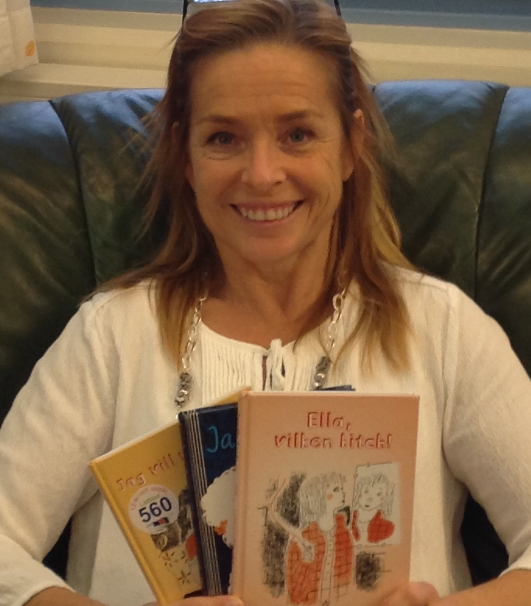 Författaren Pernilla Gesén under författarbesök på Hjulsta grundskola november 2016